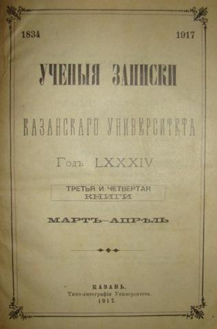 Учёные записки Казанского университета. — 1917. — Год LXXXIV. — Кн. 3-4 (Март-Апрель). — Титульный лист.